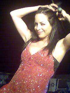 מיכל אמדורסקי אני צילמתי את מיכל אמדורסקי בחגיגת העצמאות.